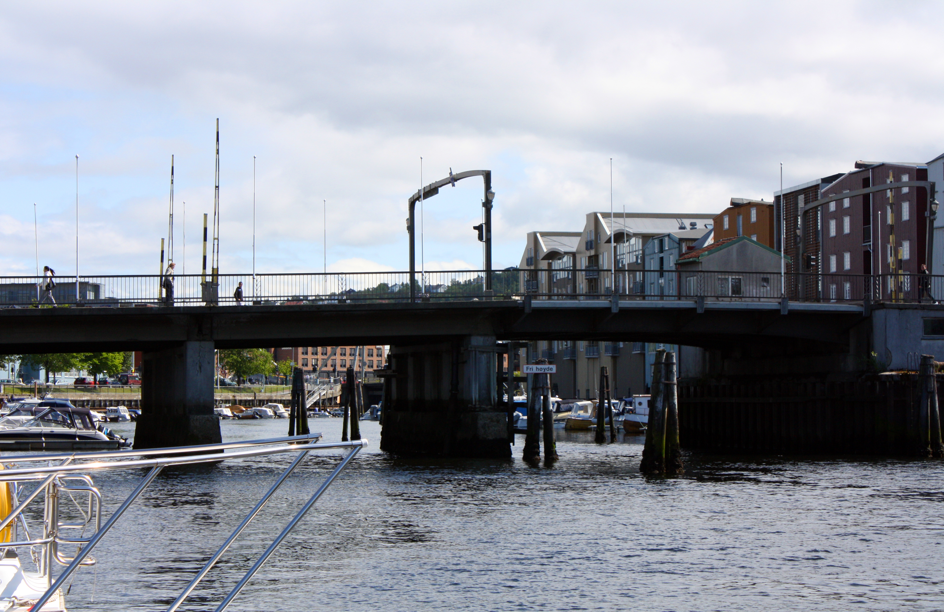 Jernbanebrua